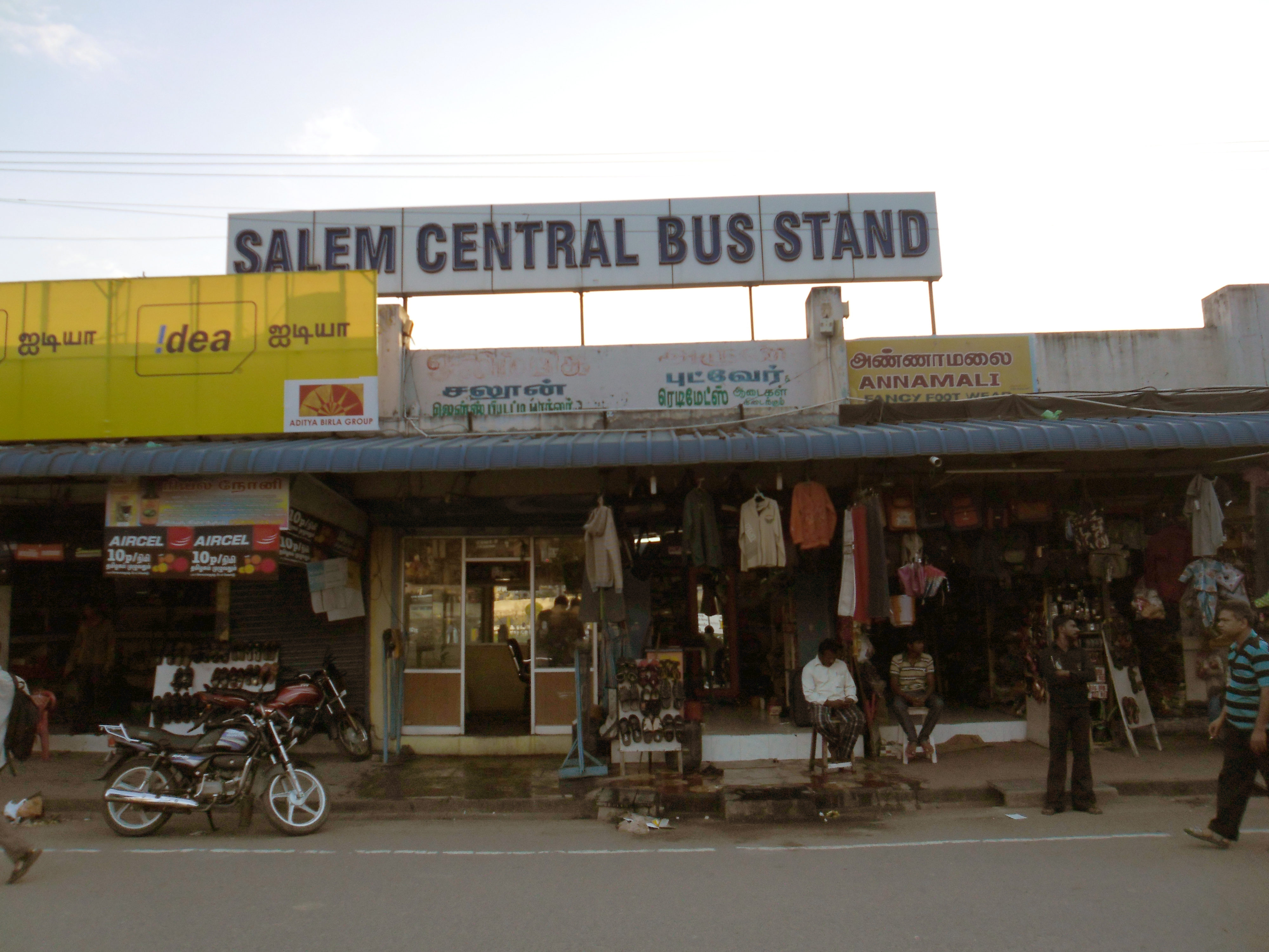 சேலம் மத்திய பேருந்து நிலையம்